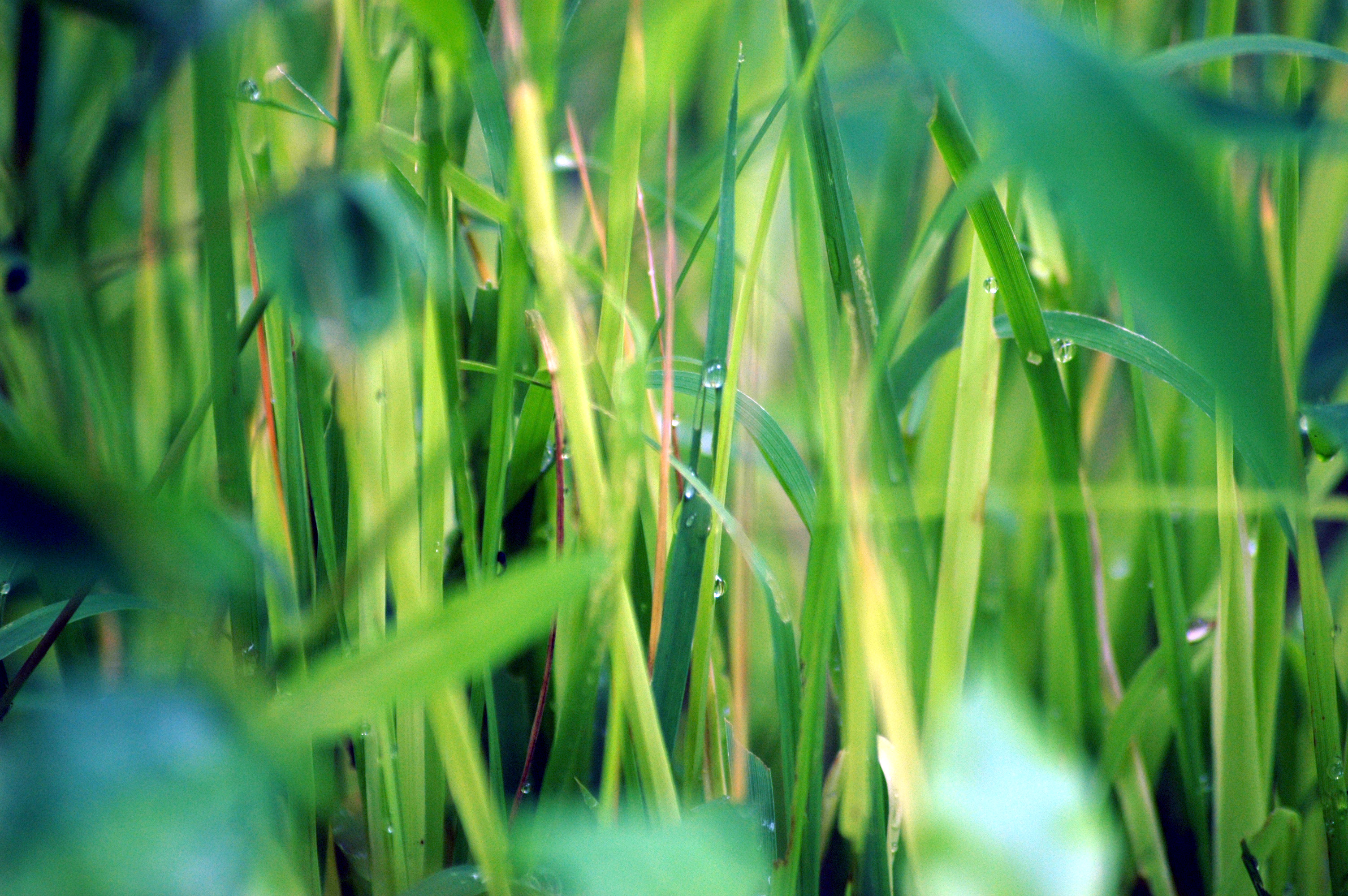 നെൽച്ചെടി